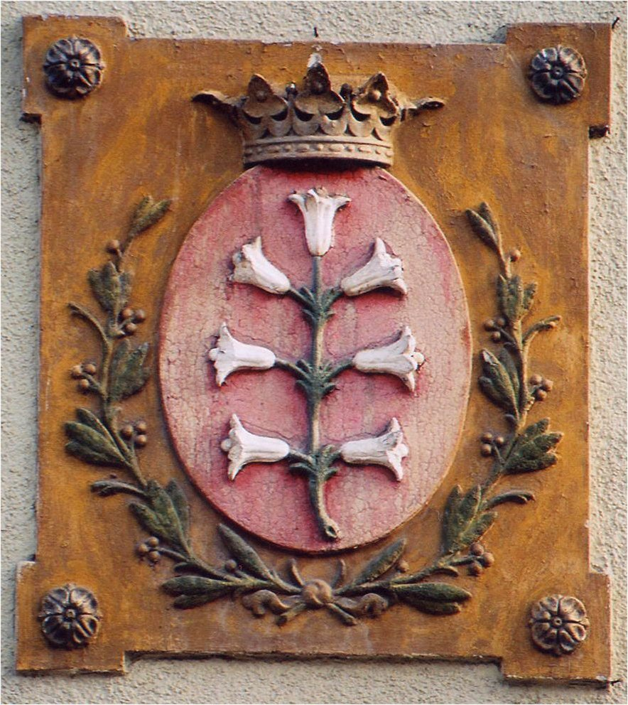 Liebstadt: Stadtwappen an einem Haus am Markt.